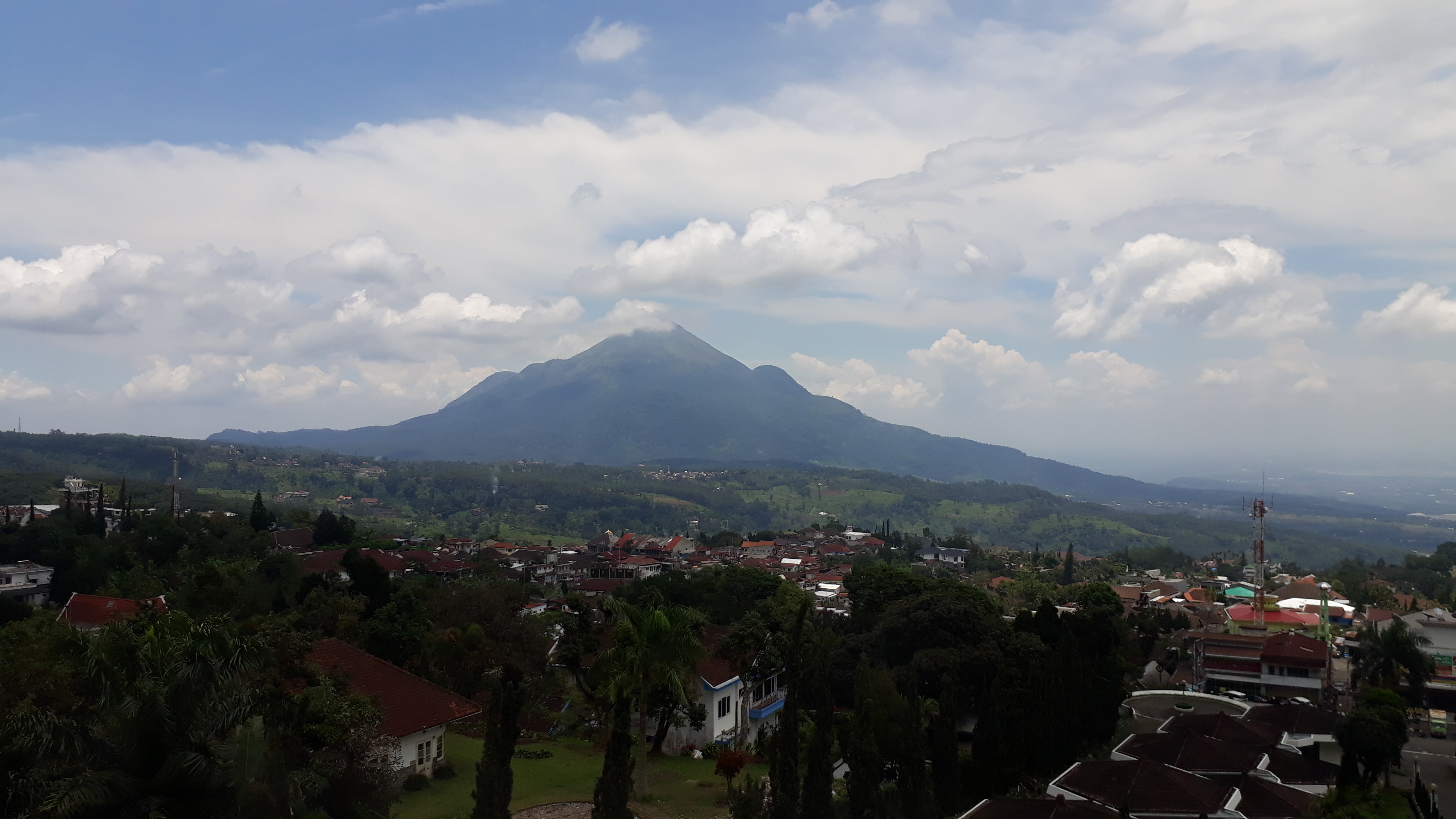 Surya Hotel & Cottages Prigen 2018-07-10